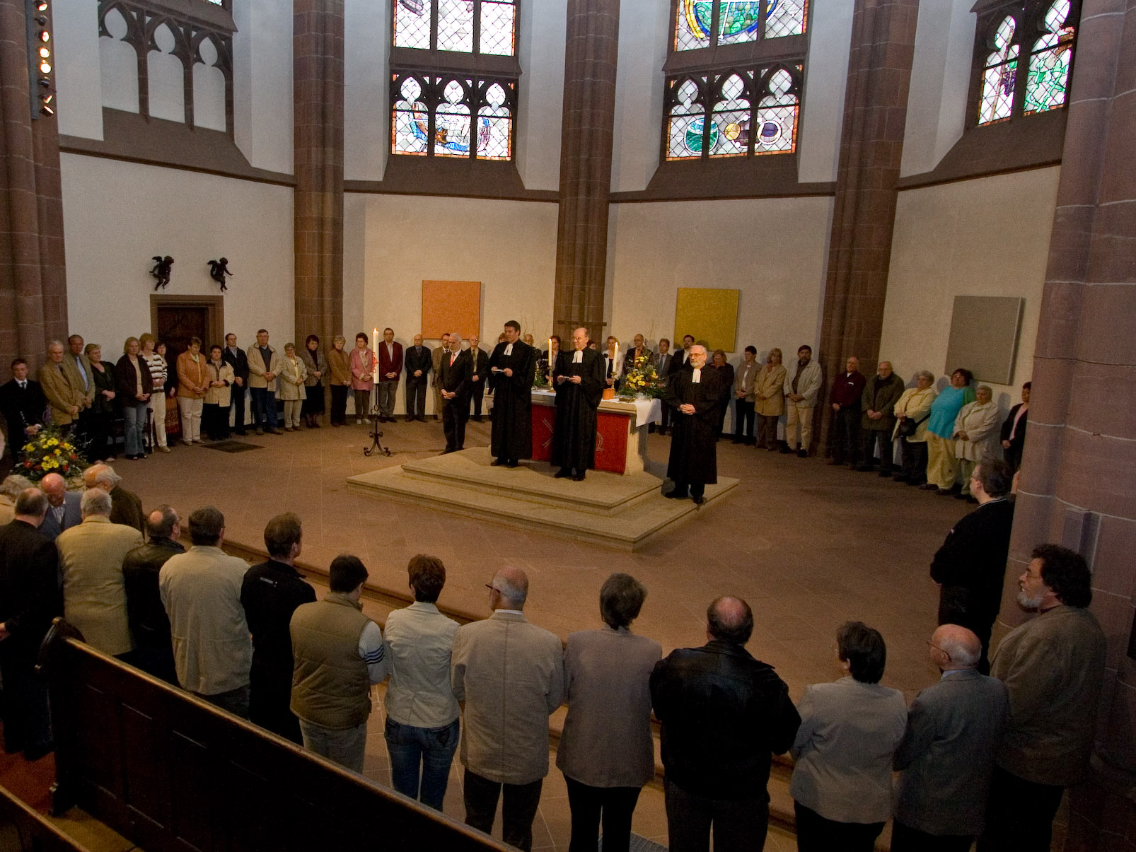 Abendmahl bei einem Gottesdienst in der Dreikönigskirche (Frankfurt am Main) unter Leitung von Peter Steinacker (Präsident der Ev. Kirchen Hessen und Nassau)